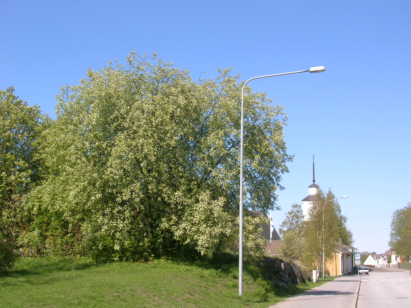 Blommande Hägg i Nykarleby. I bakgrunden S:t Birgitta kyrka.